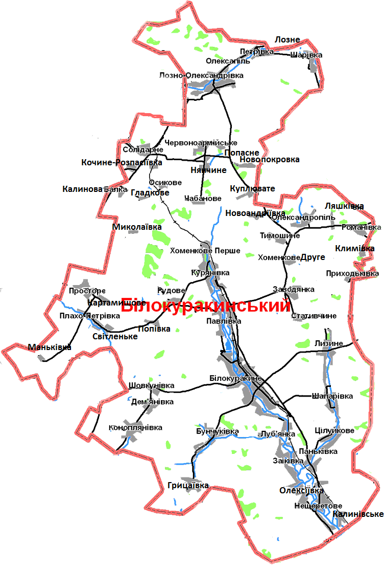 Карта населених пунктів Білокуракинського району Луганської області України разом із автошляхами з твердим покриттям, залізницею, річками та лісами.